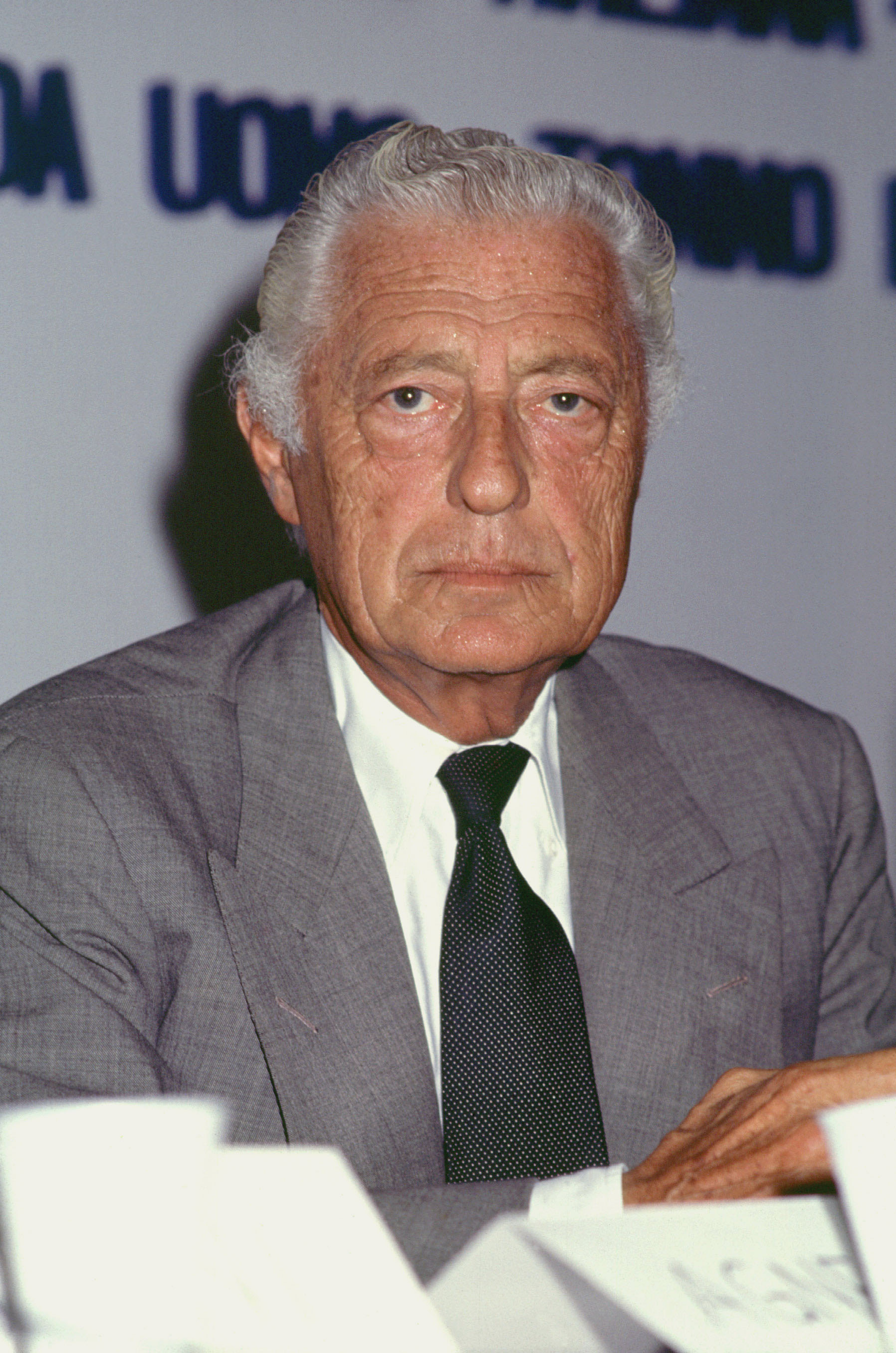 L'avvocato Gianni Agnelli